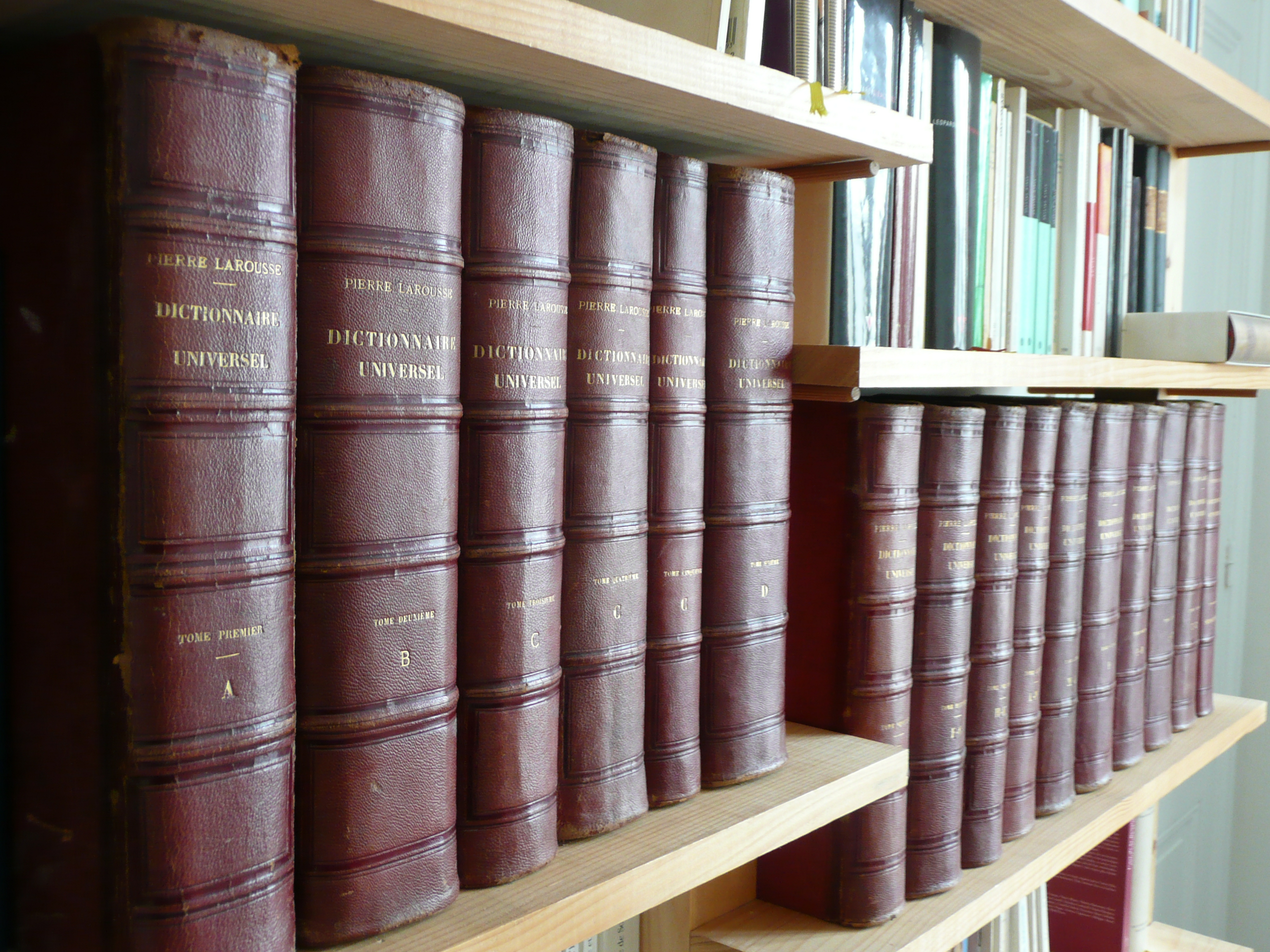 Grand Larousse du XIXe siècle, dictionnaire encyclopédique de Pierre Larousse en 15 volumes publiés de 1866 à 1876, suivis de 2 suppléments en 1877 et 1878 (ici, manque le 2ème supplément).